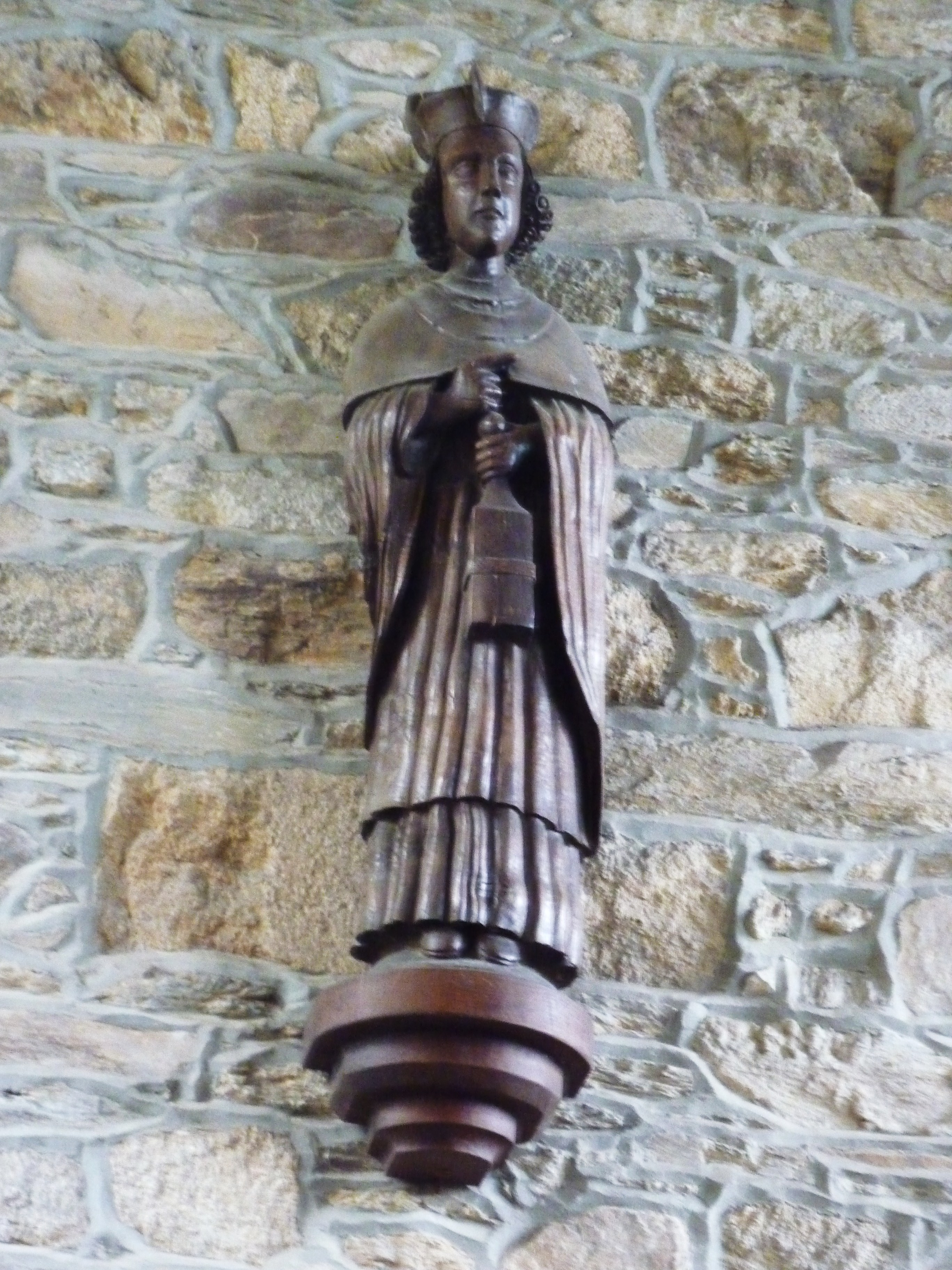 Tréguier, mairie : statue de saint Yves